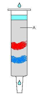 Schéma d'une colonne d'élution / Elution column diagram